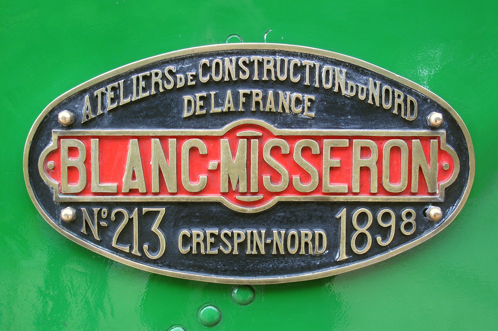 Plaque de constructeur Blanc-Misseron de la locomotive 030 T 60 des « Tramways de la Sarthe » le 3 octobre 2010.